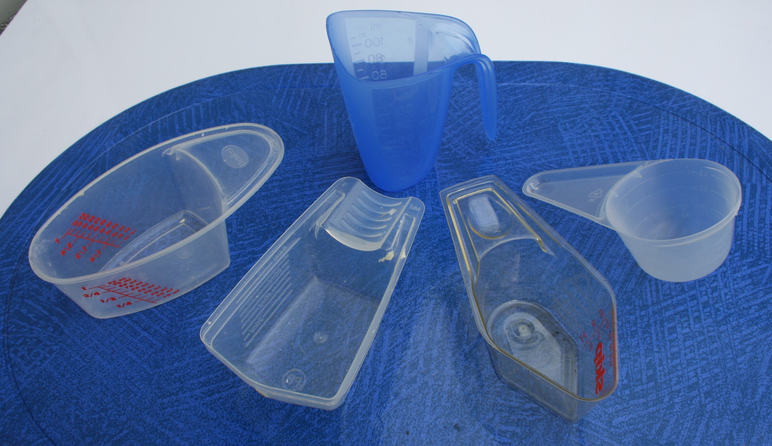 Dosierhilfen verschiedener Waschmittelhersteller